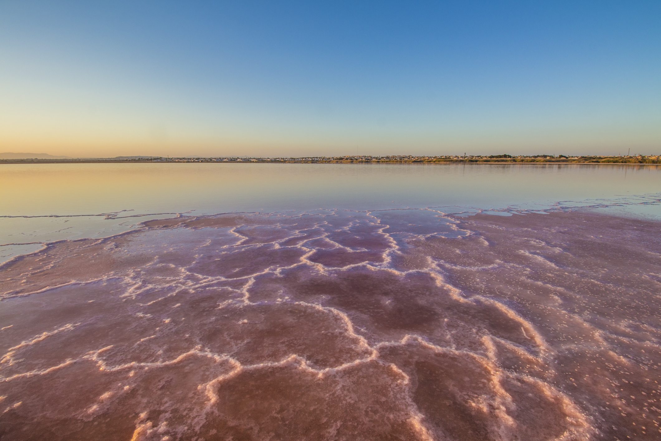 Parque natural de las Lagunas de La Mata y Torrevieja This is a photography of a Site of Community Importance in Spain with the ID: ES0000059. Natura2000 entry, EEA entry